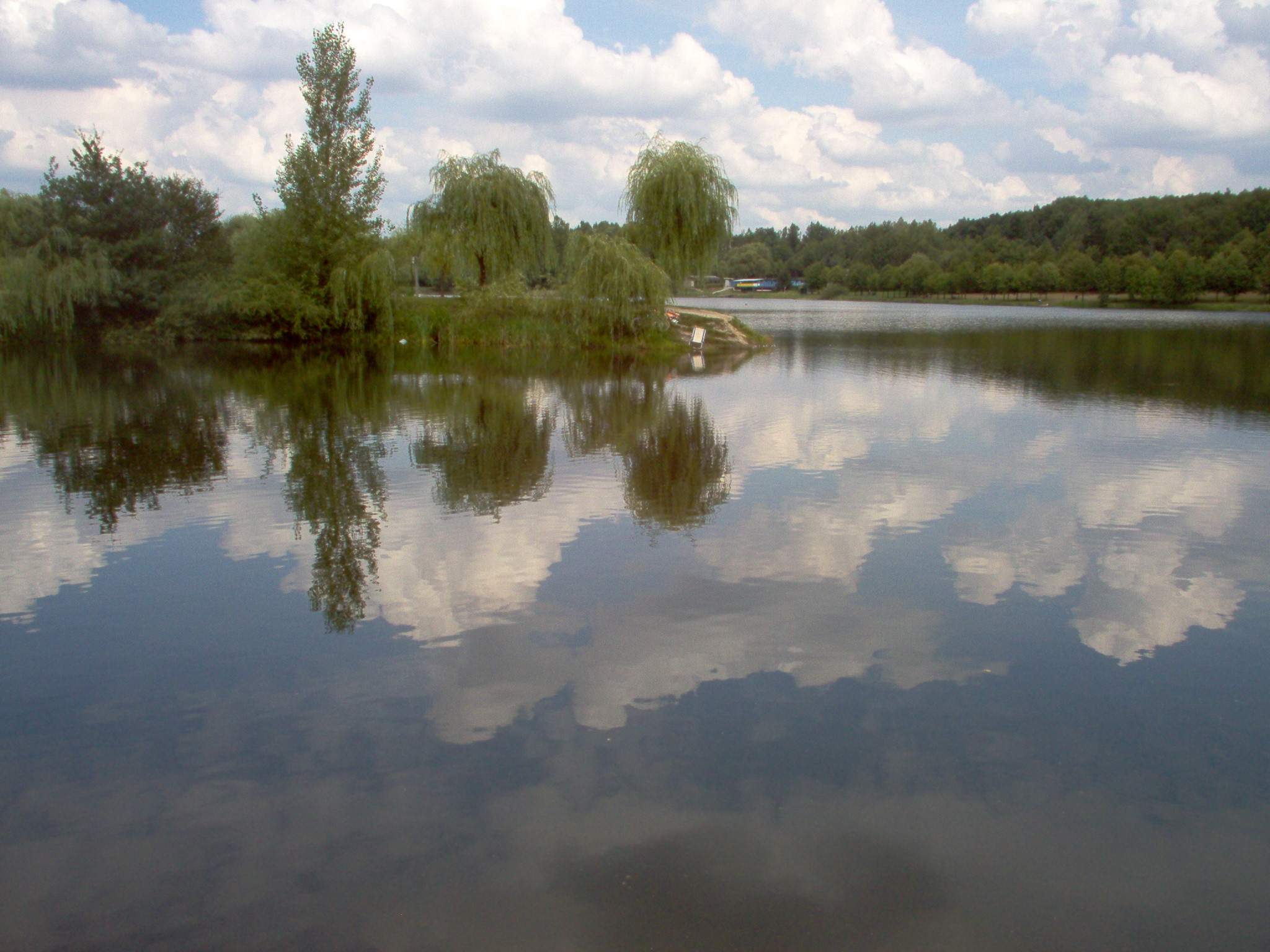 Dolina Trzech Stawów w Katowicach